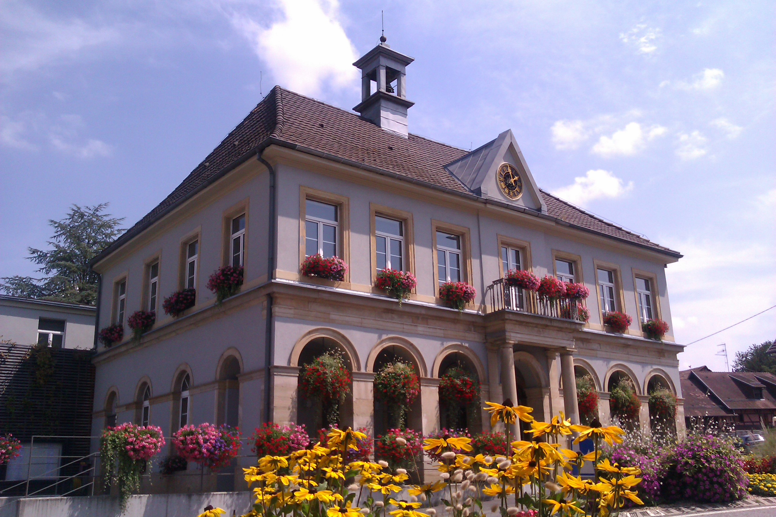 La mairie